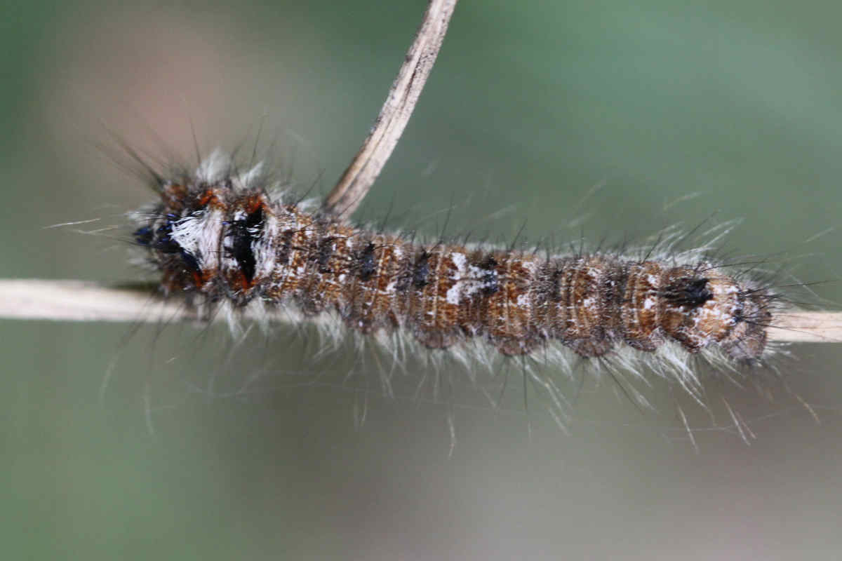 Raupe des Kiefernspinners (Dendrolimus pini) am 14.4.2017 in der Schwetzinger Hardt